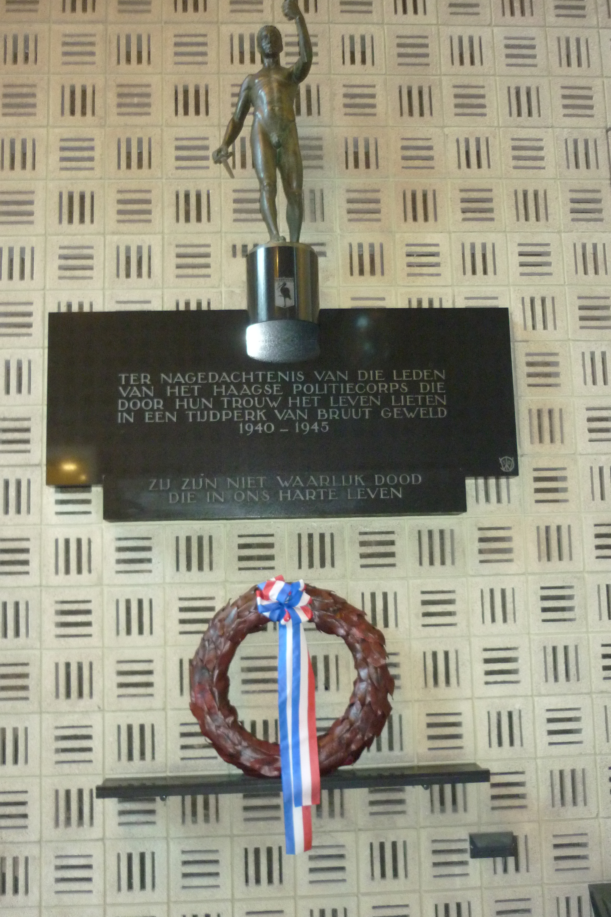 Monument bij de voormalige ingang vam het hoofdbureau Politie Haaglanden